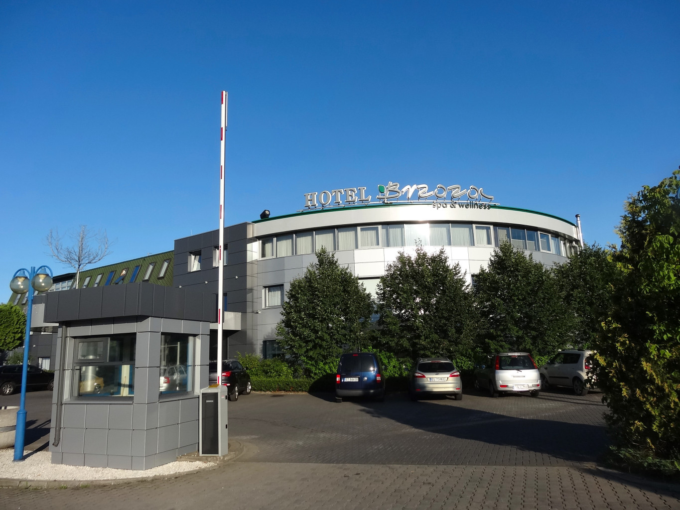 Hotel Brzoza koło Bydgoszczy w Brzozie, gmina Nowa Wieś Wielka, powiat bydgoski